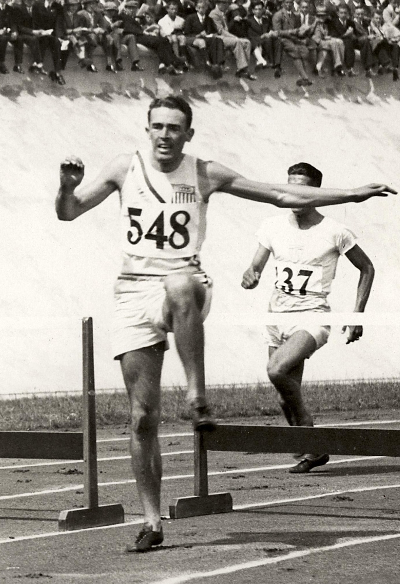 Sport. Olympische Spelen 1928 Amsterdam, Nederland : Opname uit de serie van de 400 m horden : de Amerikaan Maxwell.